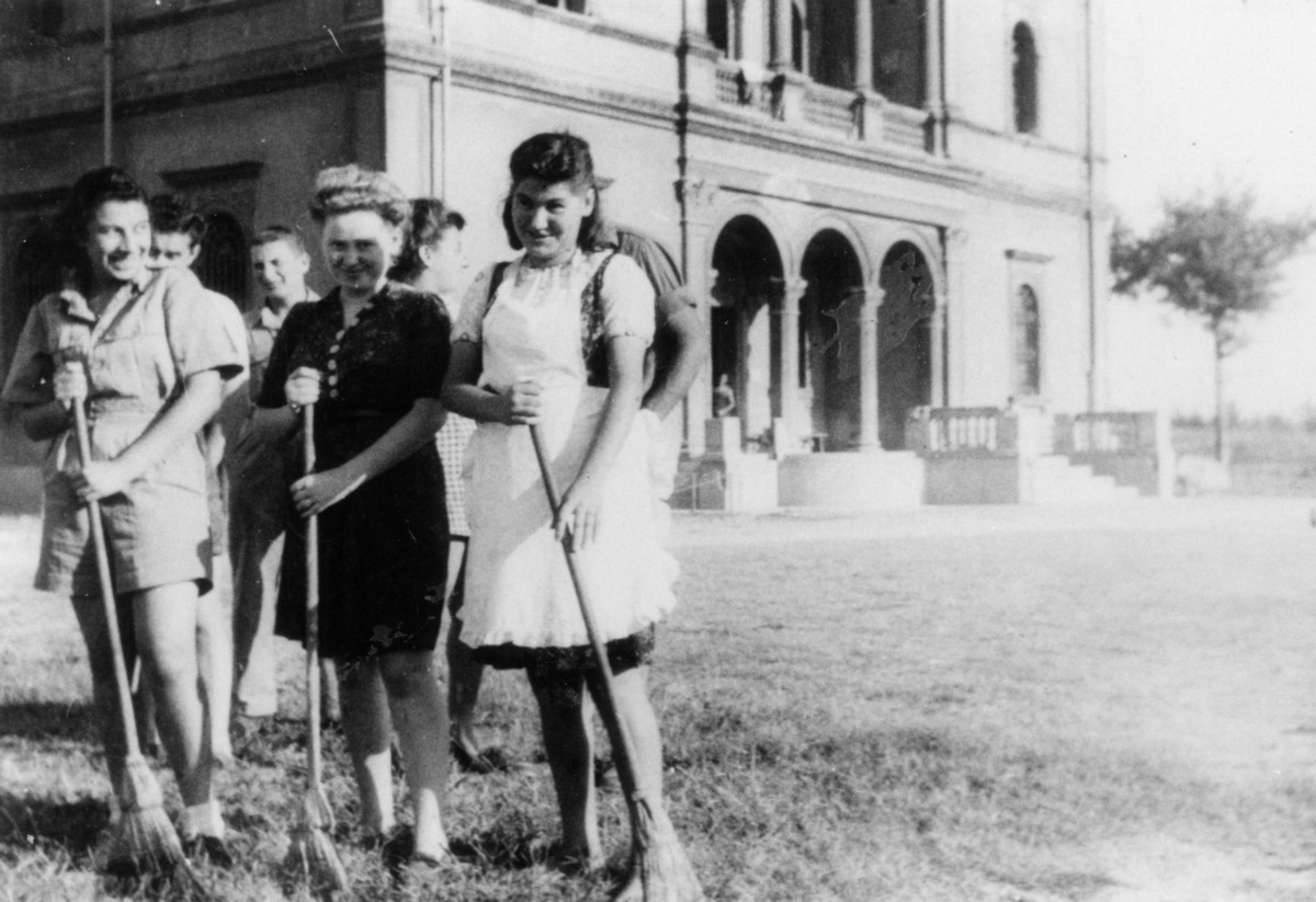 אימוני הפלמ"ח לבני הנוער החלוצי באירופה - נוננטולה(איטליה): וילה אמה מיאר-חוותהכשרה חקלאית ומחסן דלק וציוד לאניות מעפילים 1945-6 - בפתח הארמון